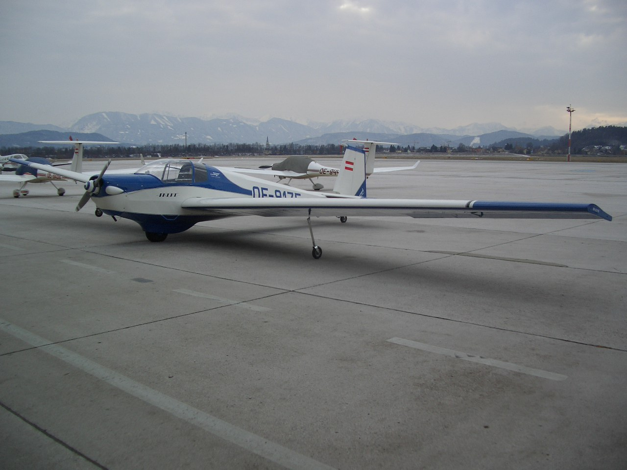 SF25B